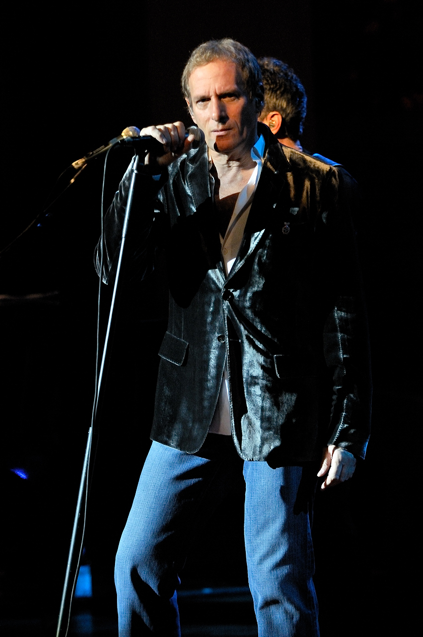 Michael Bolton en el Palau de la Música de Barcelona el 14 de Enero de 2010